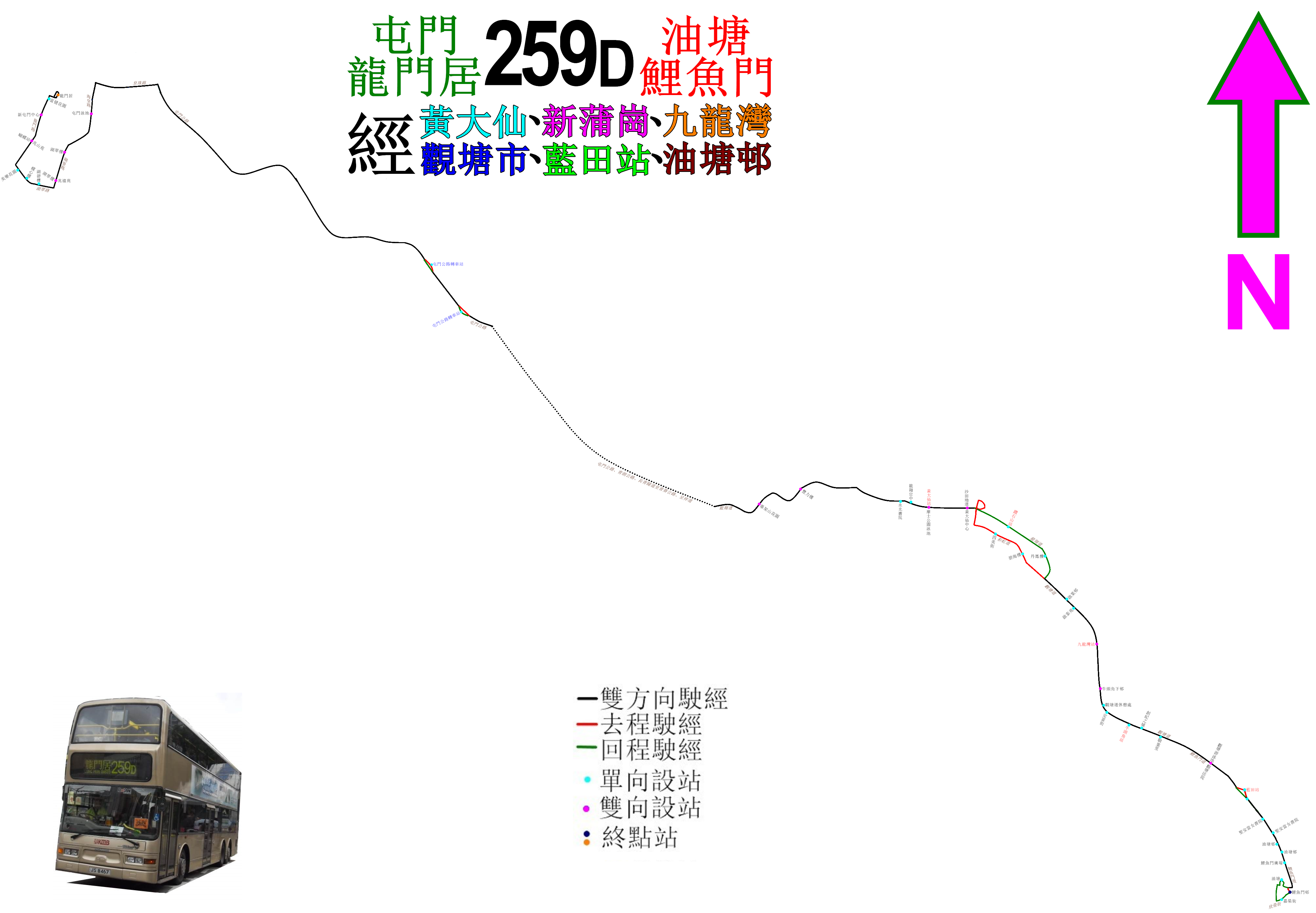 中文（香港）: 九巴259D線的走線圖，藍綠色表示只在非繁忙時間才會駛經，而繁忙時間改行藍色路段